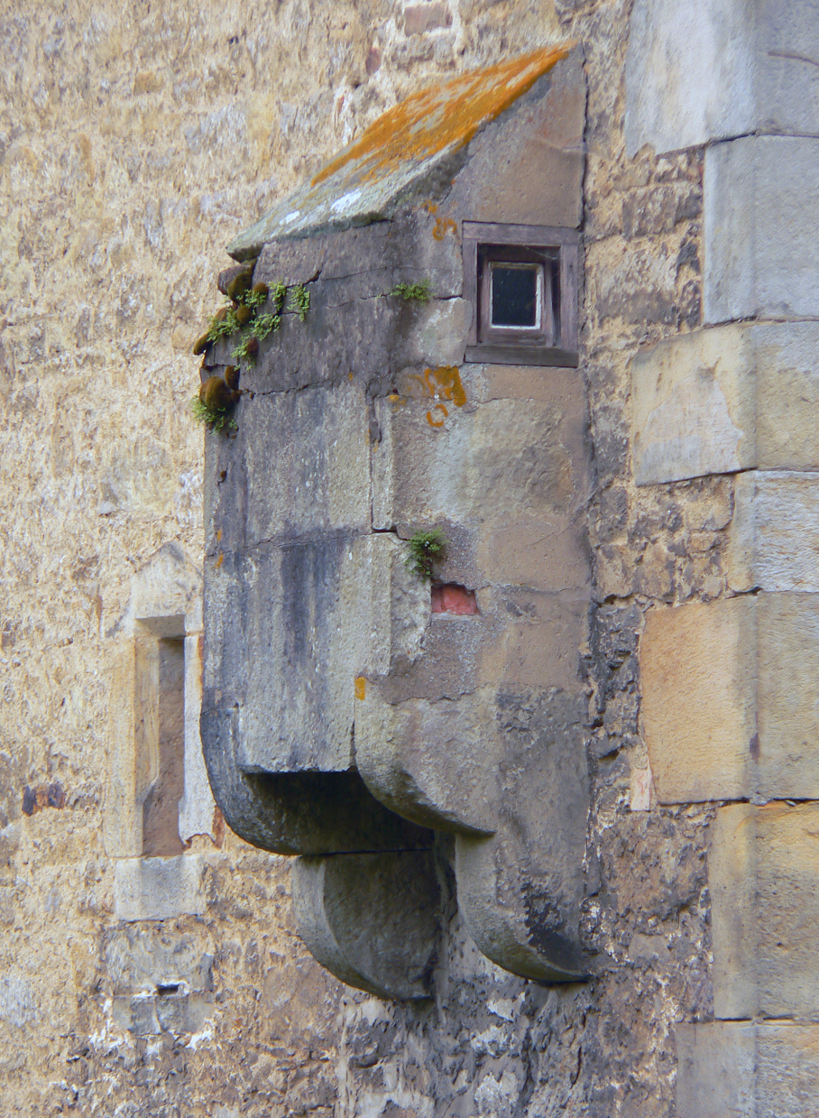 Aborterker Schloss Hülsede